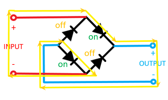 Gambar Skema Aliran Tegangan pada Kondisi Pertama Dioda Bridge